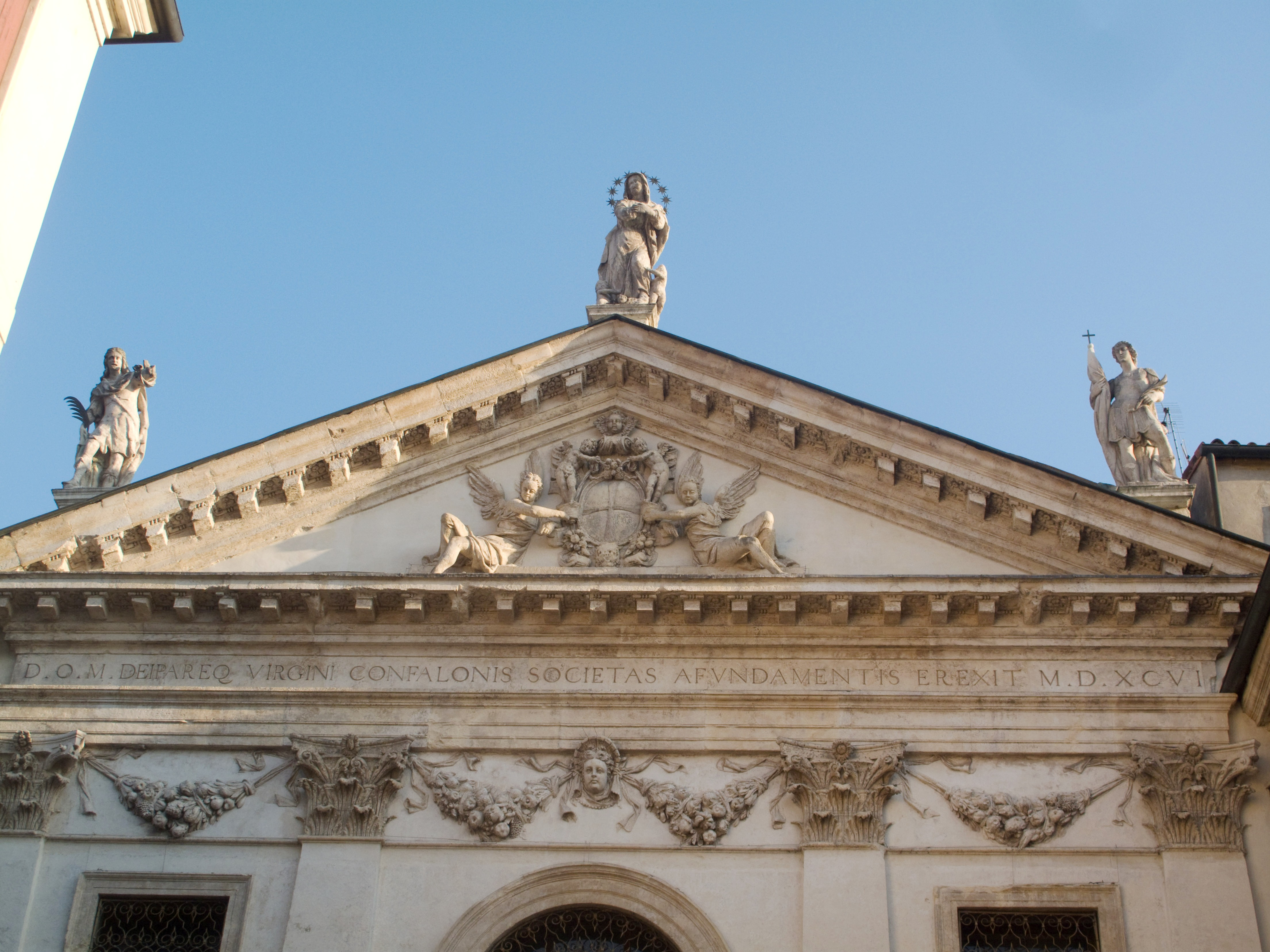 Vicenza - Oratorio del Gonfalone, frontone Giovanni Battista Albanese (1573–1630) Description Italian sculptor and architect Date of birth/death15731630Location of birth/deathVicenzaVicenzaWork locationVeneto (Italy)Authority control VIAF: 74726494 ULAN: 500083441